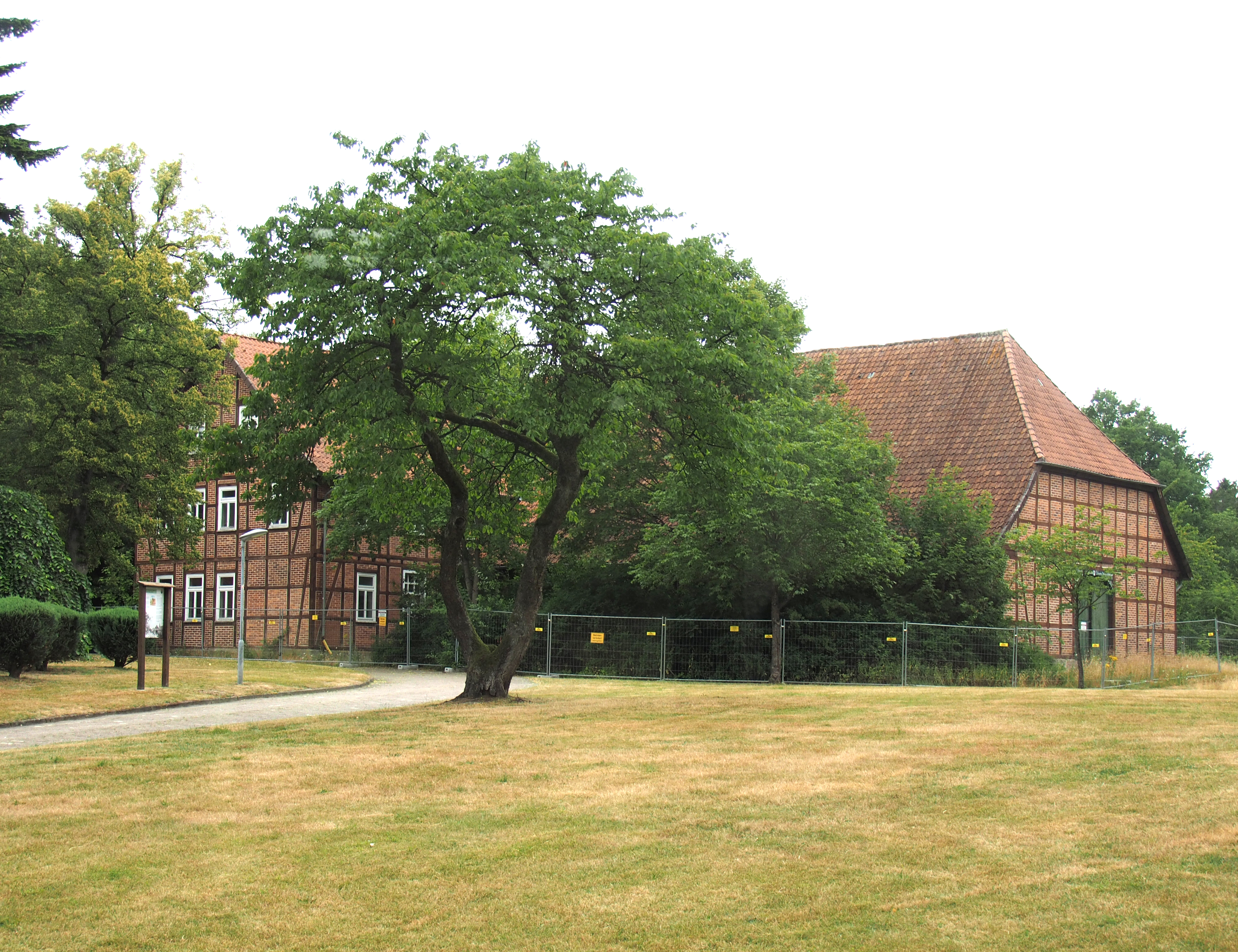 Ehemaliges Gasthaus „Wünnenhof“ in Ostenholz, gemeindefreier Bezirk Osterheide im Landkreis Heidekreis